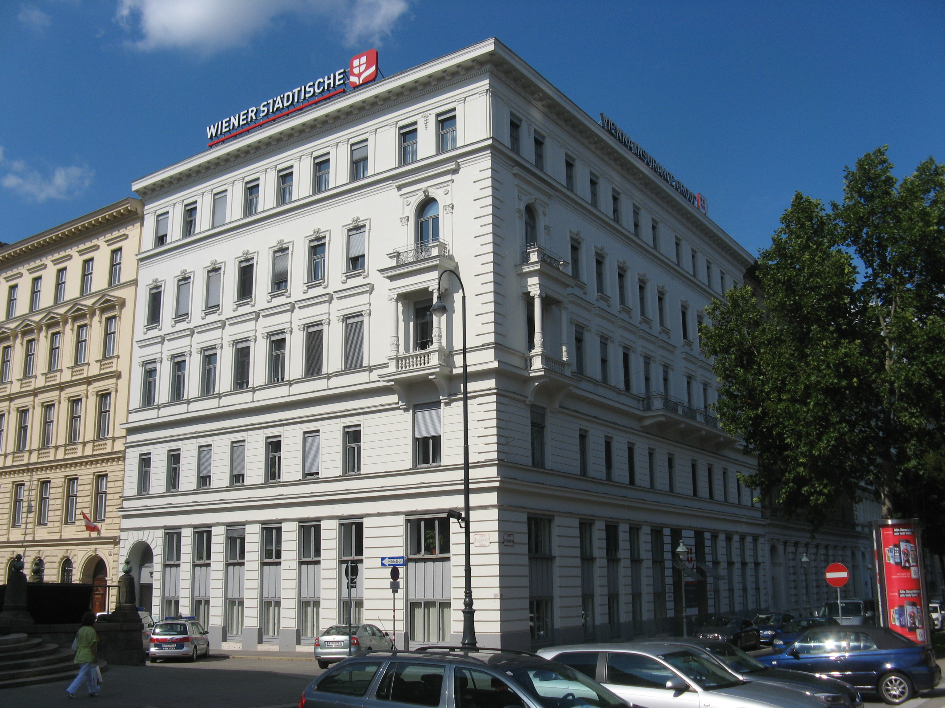 Deutschmeisterplatz 4 (1875) von Rudolf Neumayr, Wien-Innere Stadt